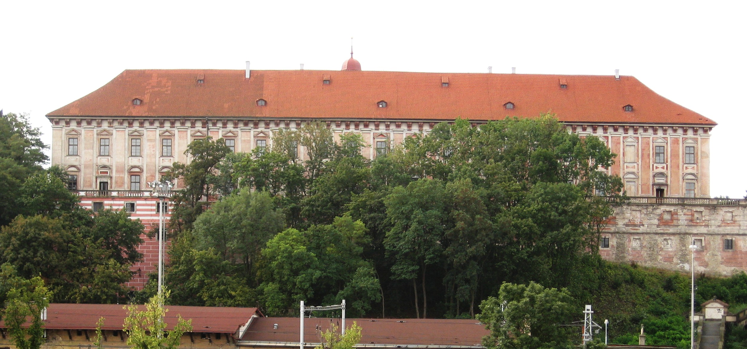 Zámek v Roudnici nad Labem, pohled z železného mostu